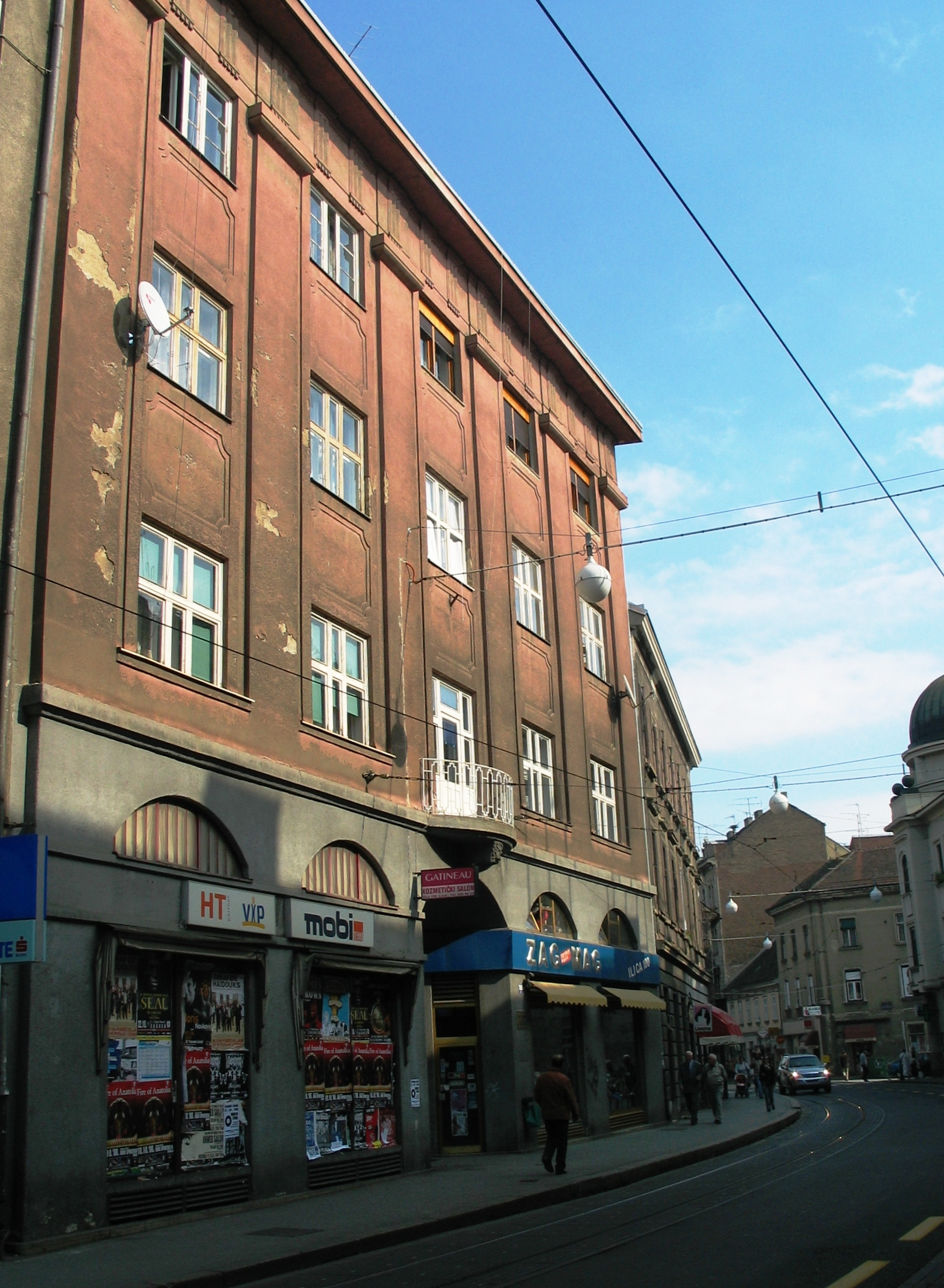 Hugo Ehrlich- Poslovno stambena trokatnica (atelijer Kovačić i Ehrlich) 1912. Ilica 100